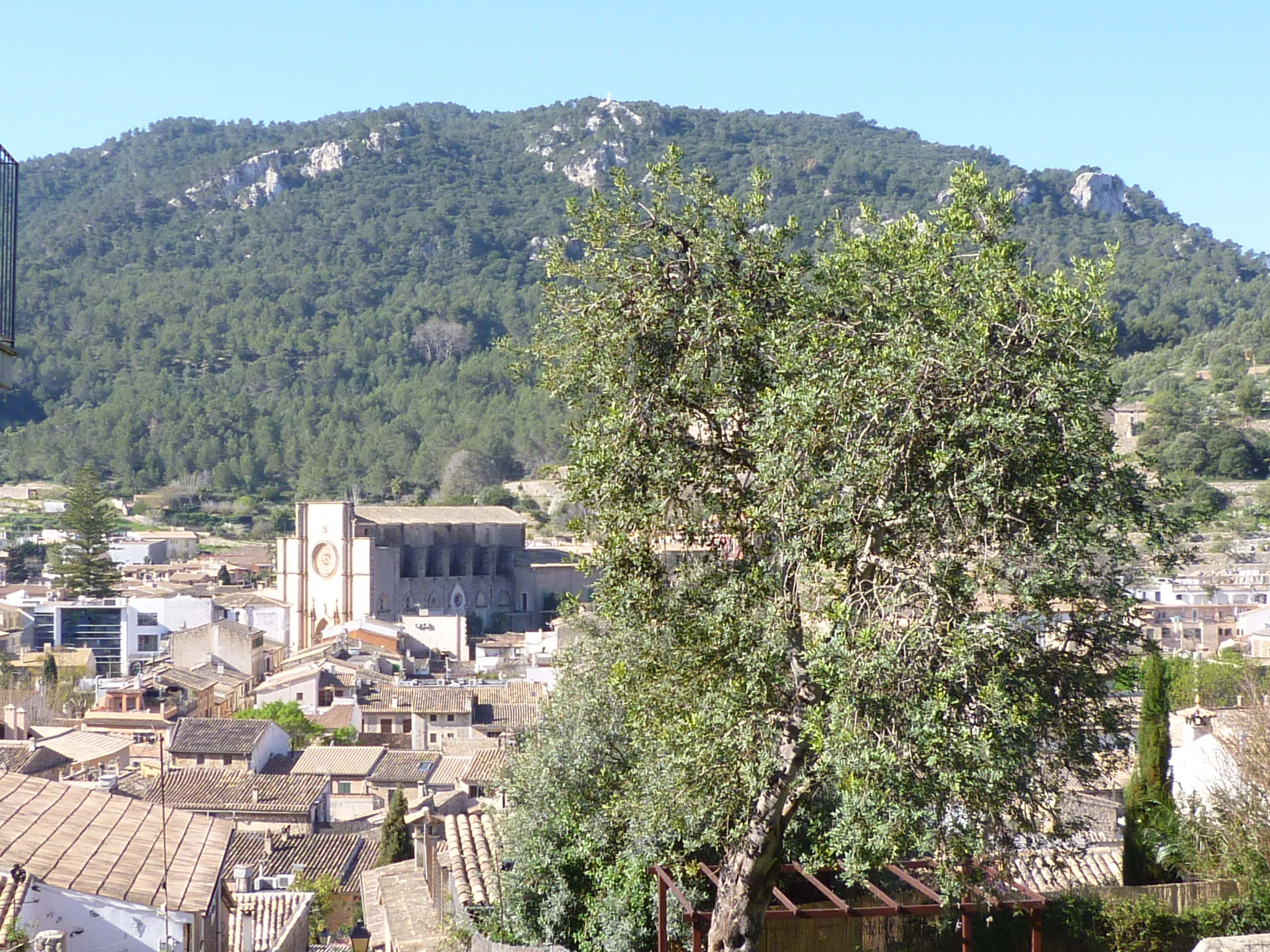 Blick über den Ort Esporles mit der großen Kirche im Zentrum. Insel Mallorca/Spanien.